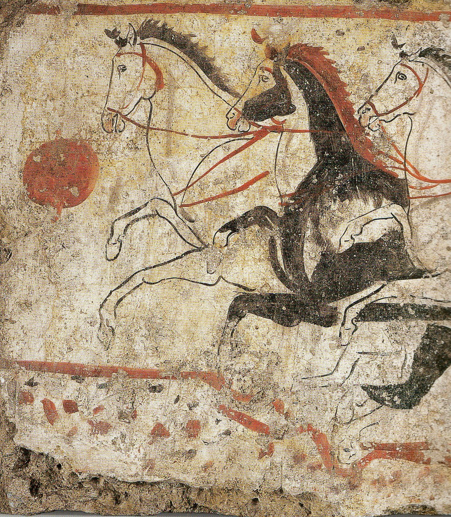 Paestum, Grab der Schecken. Detail der Längsplatte